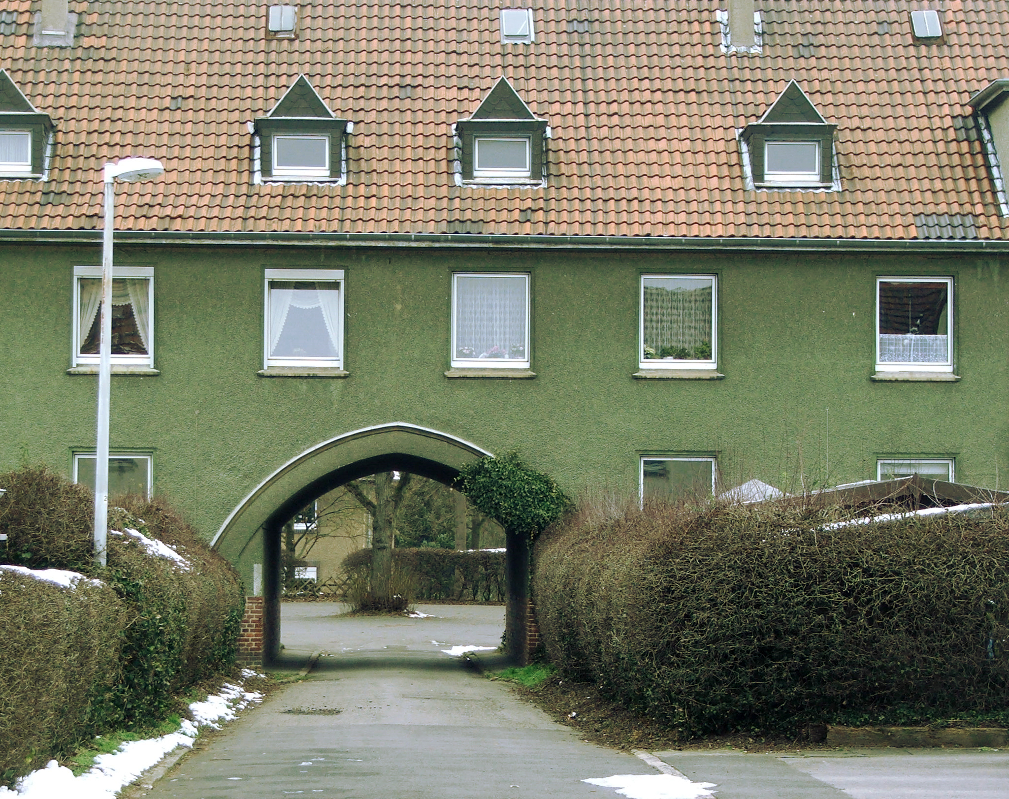 Typisches Haus in der Kreinberg-Siedlung in Schwerte, Torhaus Lichtendorfer Straße 64/66; Blick aus Richtung Am Hohenstein zur Lichtendorfer Straße